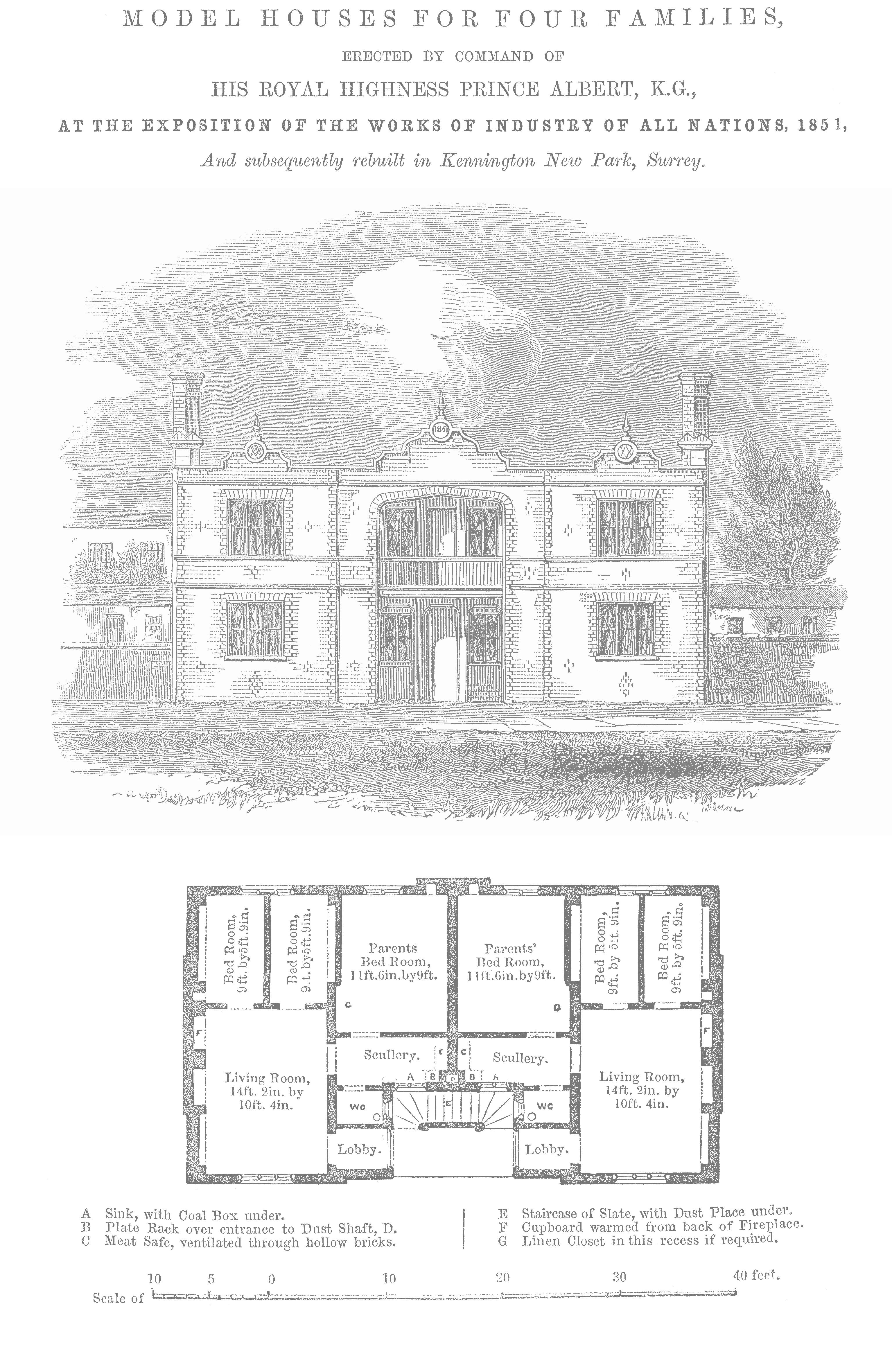 Model Houses for Families